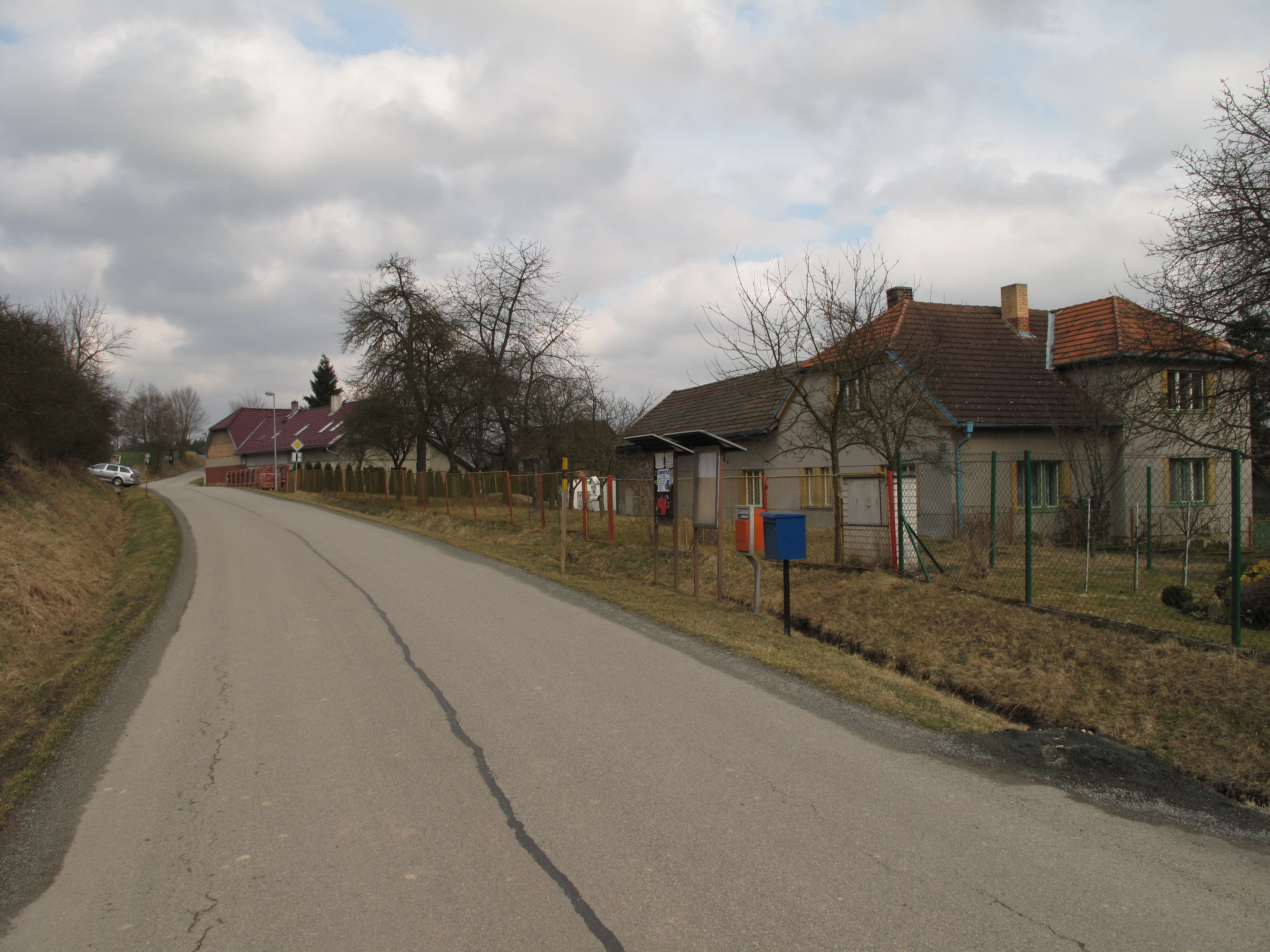 Silnice v Nové Vsi u Dolních Kralovic. Okres Havlíčkův Brod, Česká republika.